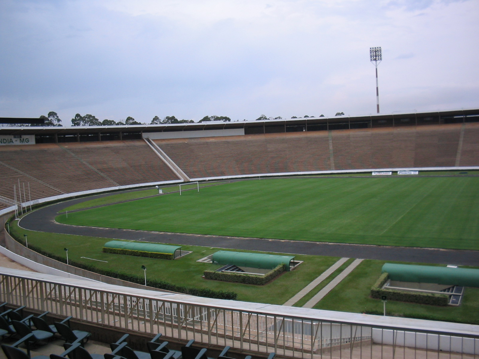 Estádio Parque do Sabiá, Uberlândia, Minas Gerais, Brasil